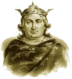 Louis VI de FranceLouis VI of Francelabel QS:Lfr,"Louis VI de France"label QS:Len,"Louis VI of France"